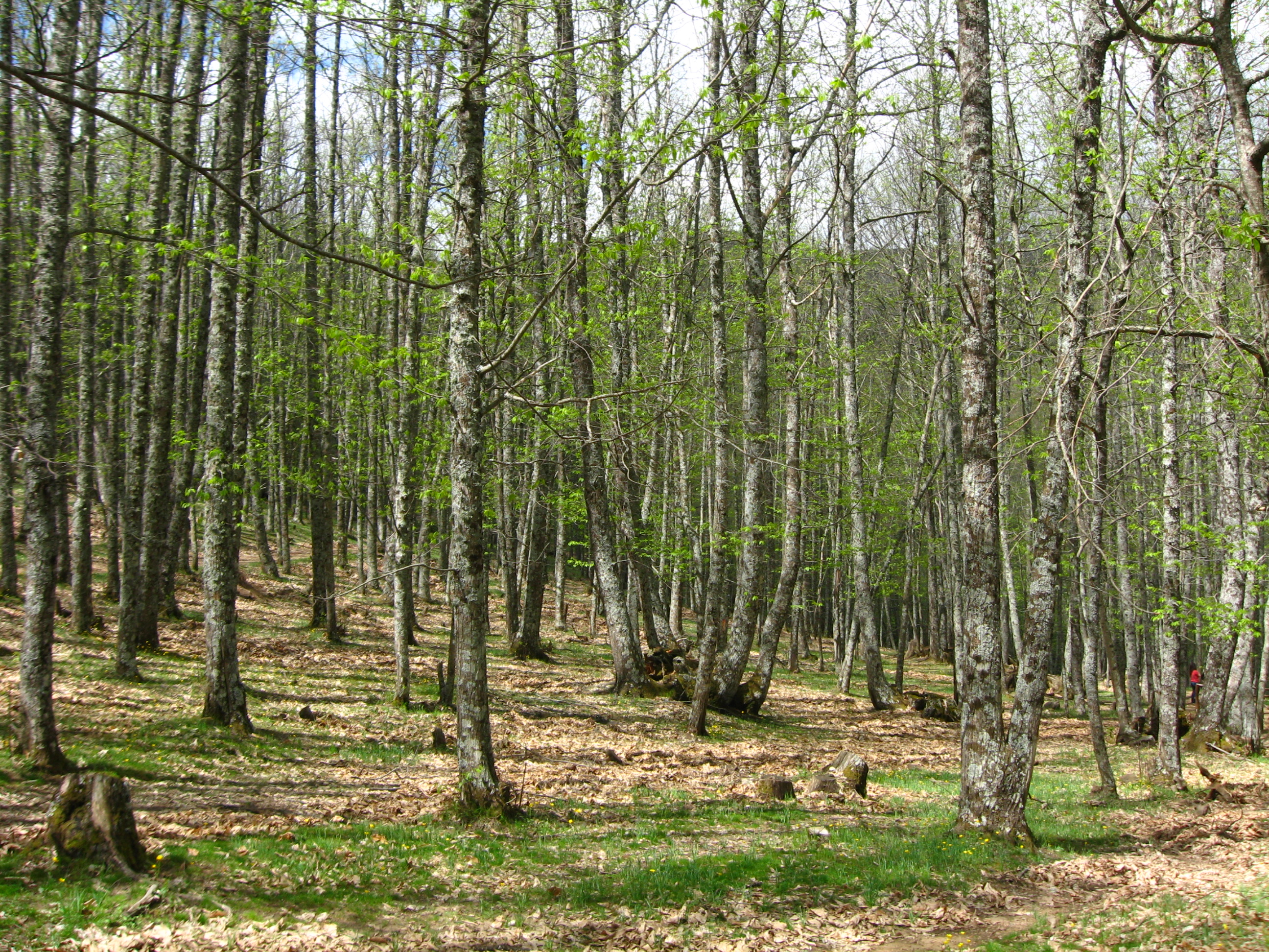 Valle de Iruelas This is a photography of a Site of Community Importance in Spain with the ID: ES0000116. Natura2000 entry, EEA entry